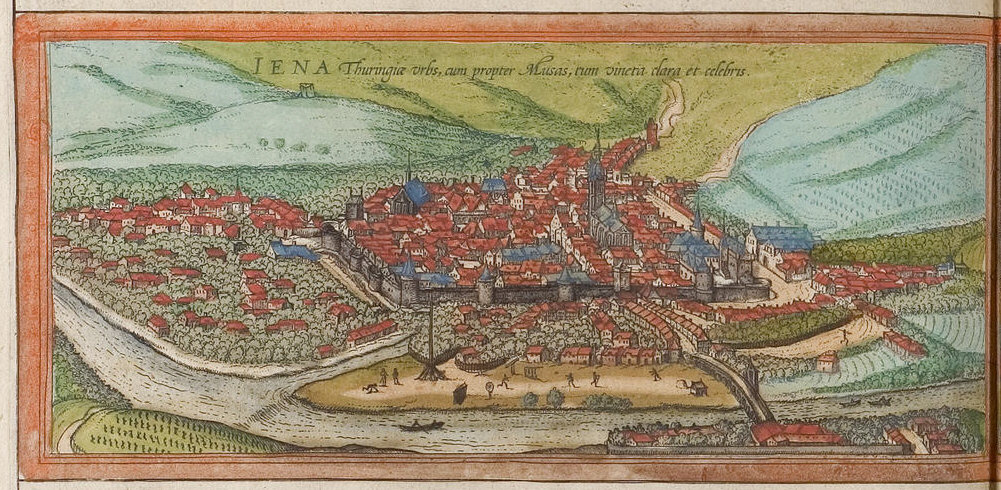 Jena